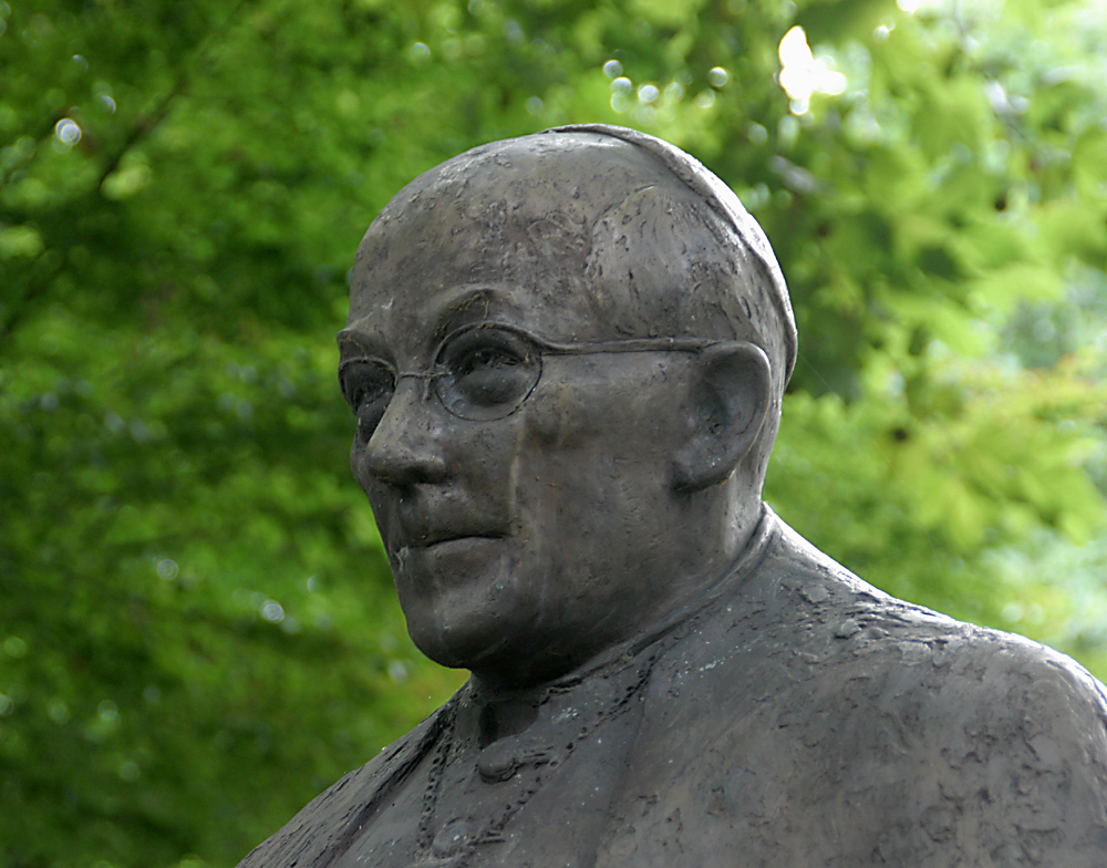 Büste Josef Kardinal Frings in Köln, von Kurt Arentz, 1998